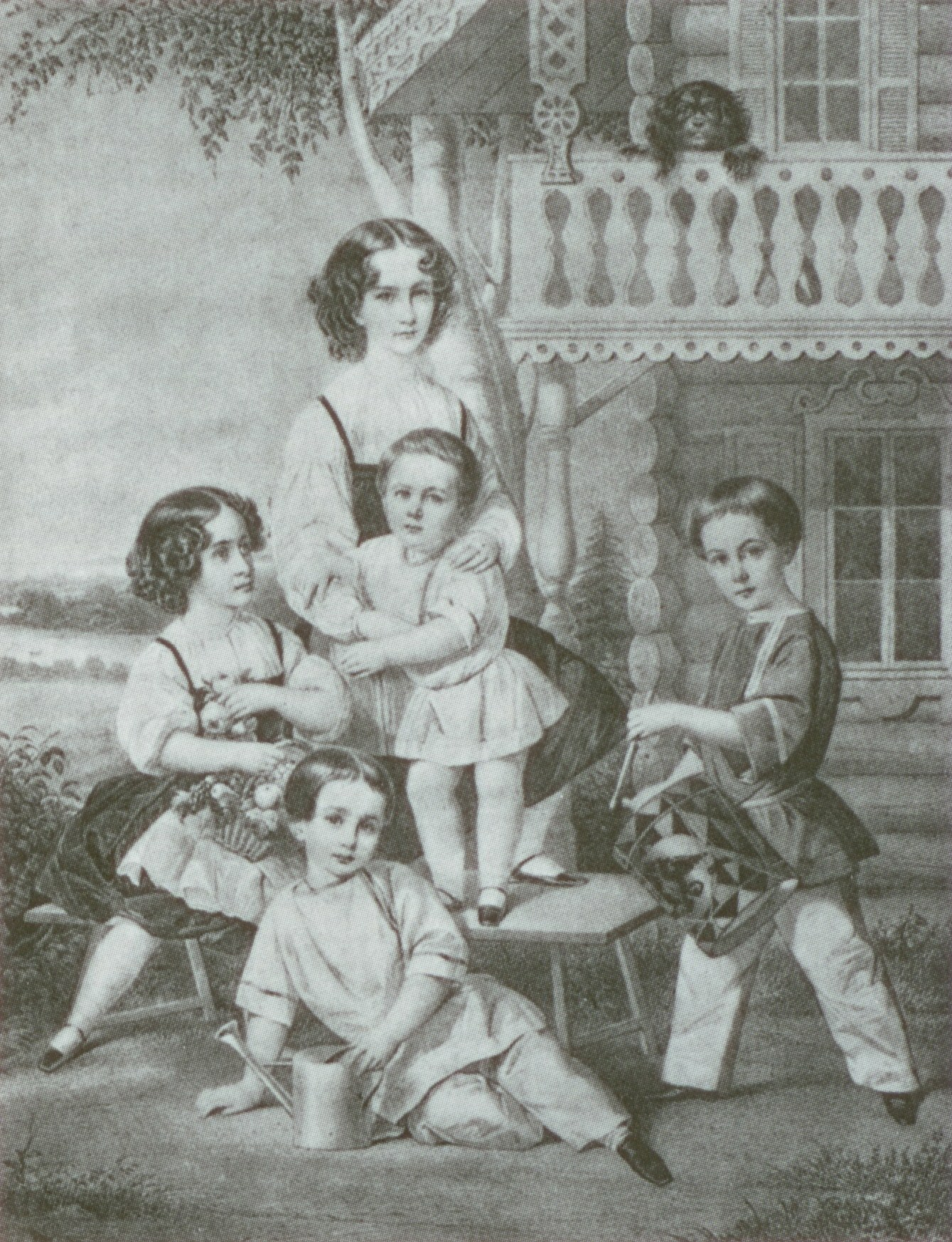 Дети Сергея Ивановича Мальцова (1810-1898) от брака с княж. Анастасией Николаевной Урусовой (1820-1894): Капитолина (1839-после 1918), в первом браке кн.Мещерская; Мария (1942-1904), в замуж. кн. Урусова; Сергей (1845-1908); Иван (1846-1920); Николай (1849-1938).